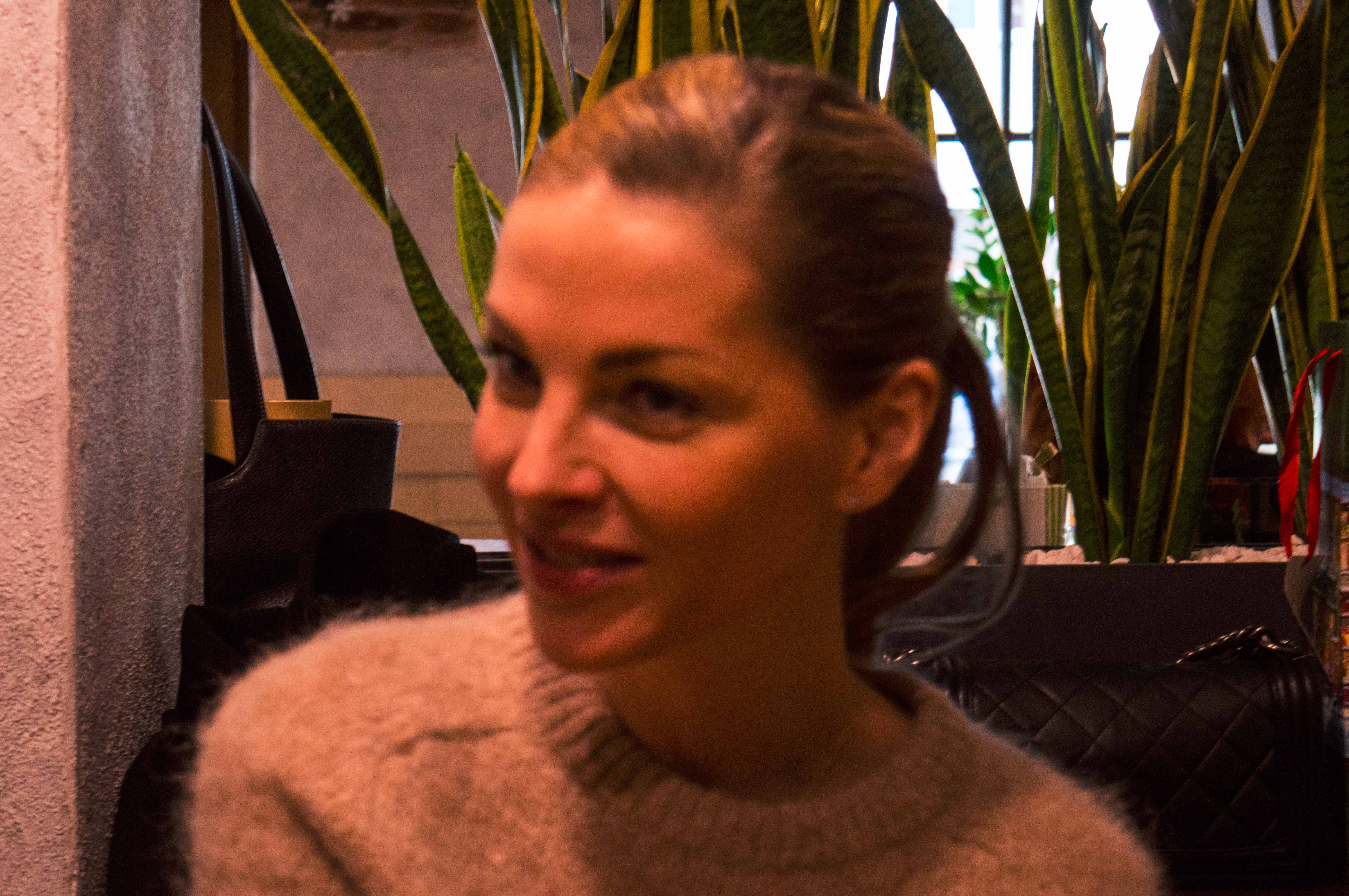 Pavlína Němcová